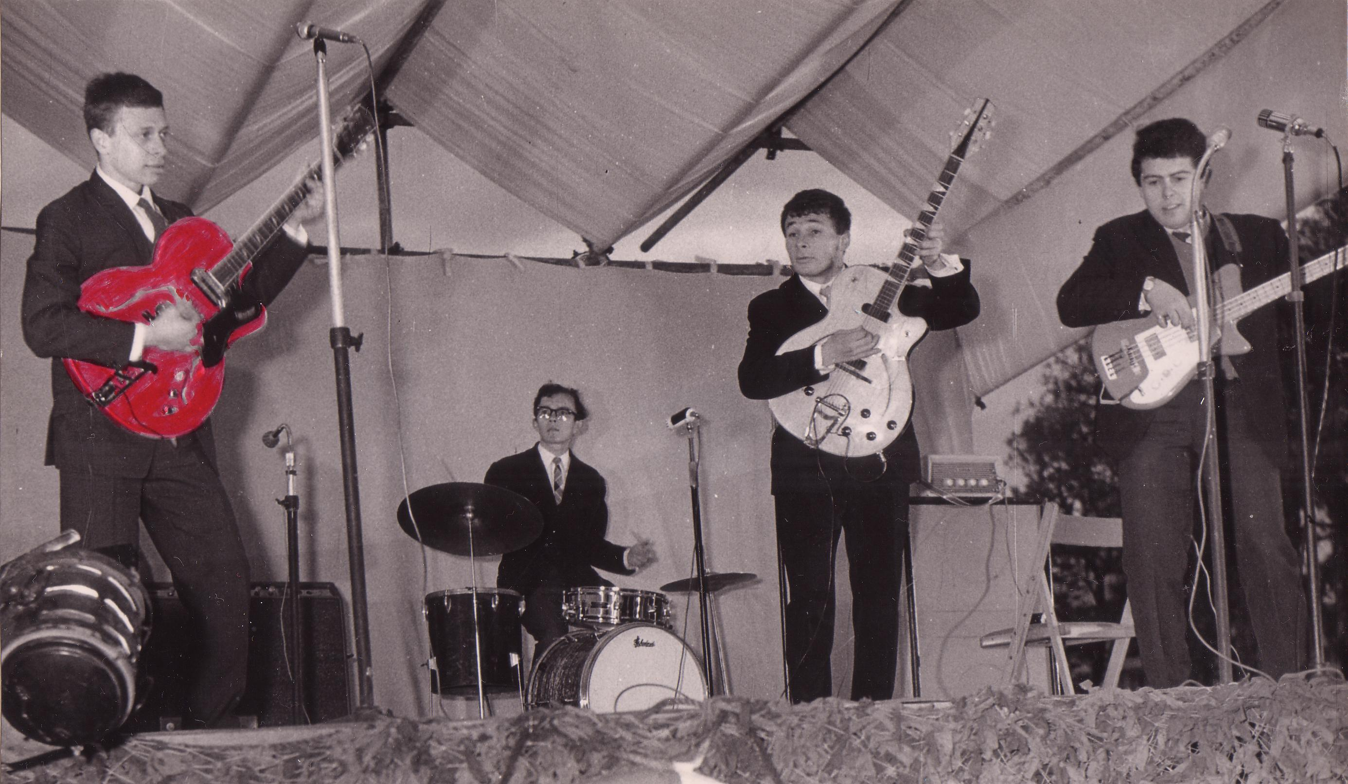 Grupa muzyczna "Nastolatki" podczas półfinału Wiosennego Festiwalu Muzyki Nastolatków w 1966 roku